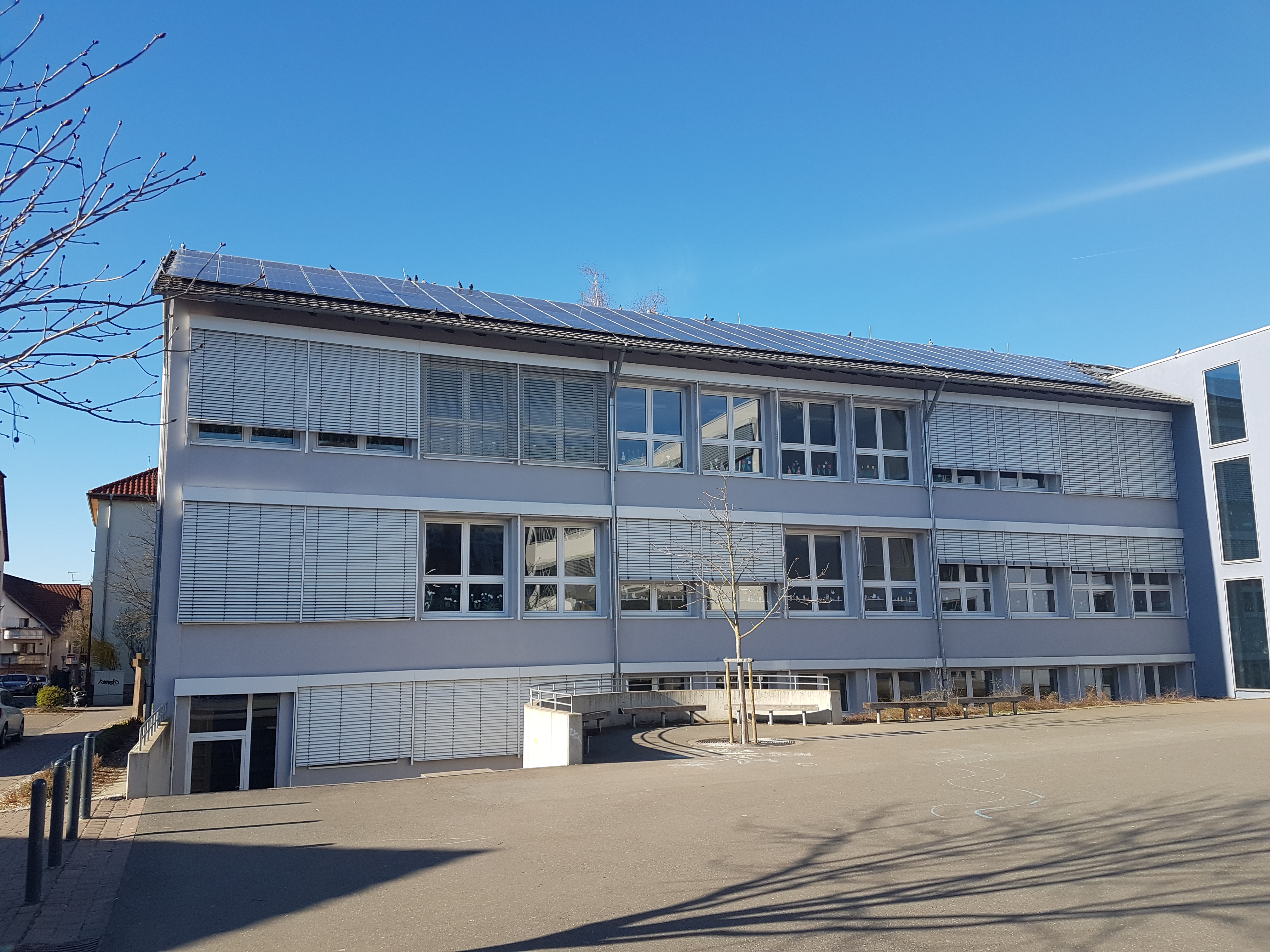 Gemeinschaftsschule Lauda-Königshofen Grundschulgebäude mit Photovoltaikanlage auf dem Dach